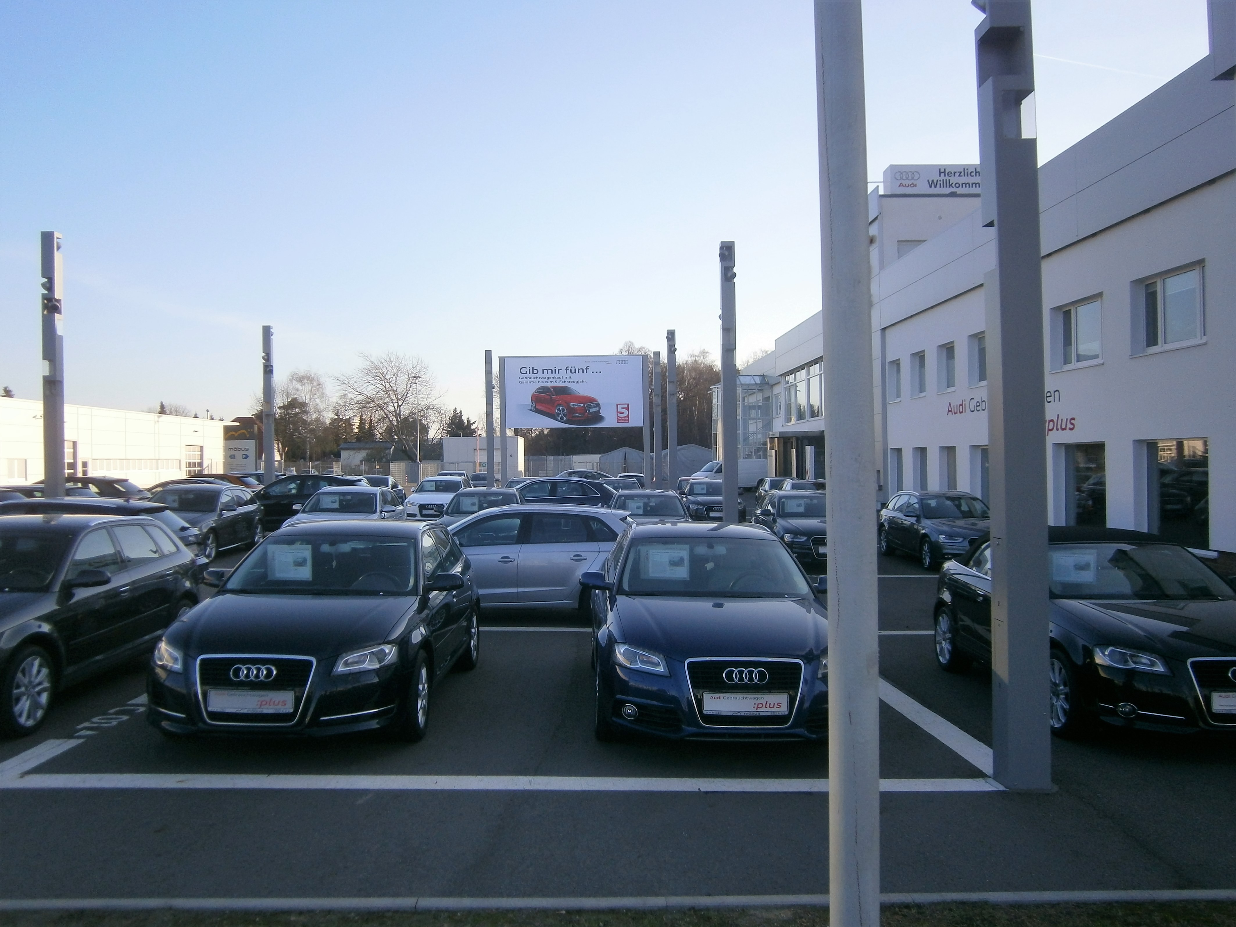 Die Hansastraße ist eine Berliner Straße mit übergeordneter Bedeutung in den Ortsteilen Alt-Hohenschönhausen und Weißensee. Sie liegt zwischen der Indira-Gandhi-Straße und der Großsiedlung Hohenschönhausen-Nord. Im Bild: die seit den 1990er Jahren als Autostellplatz eines Autohauses genutzte vormalige Industriebahntrasse auf dem (unbenannten) Grundstück Hansastraße 204.